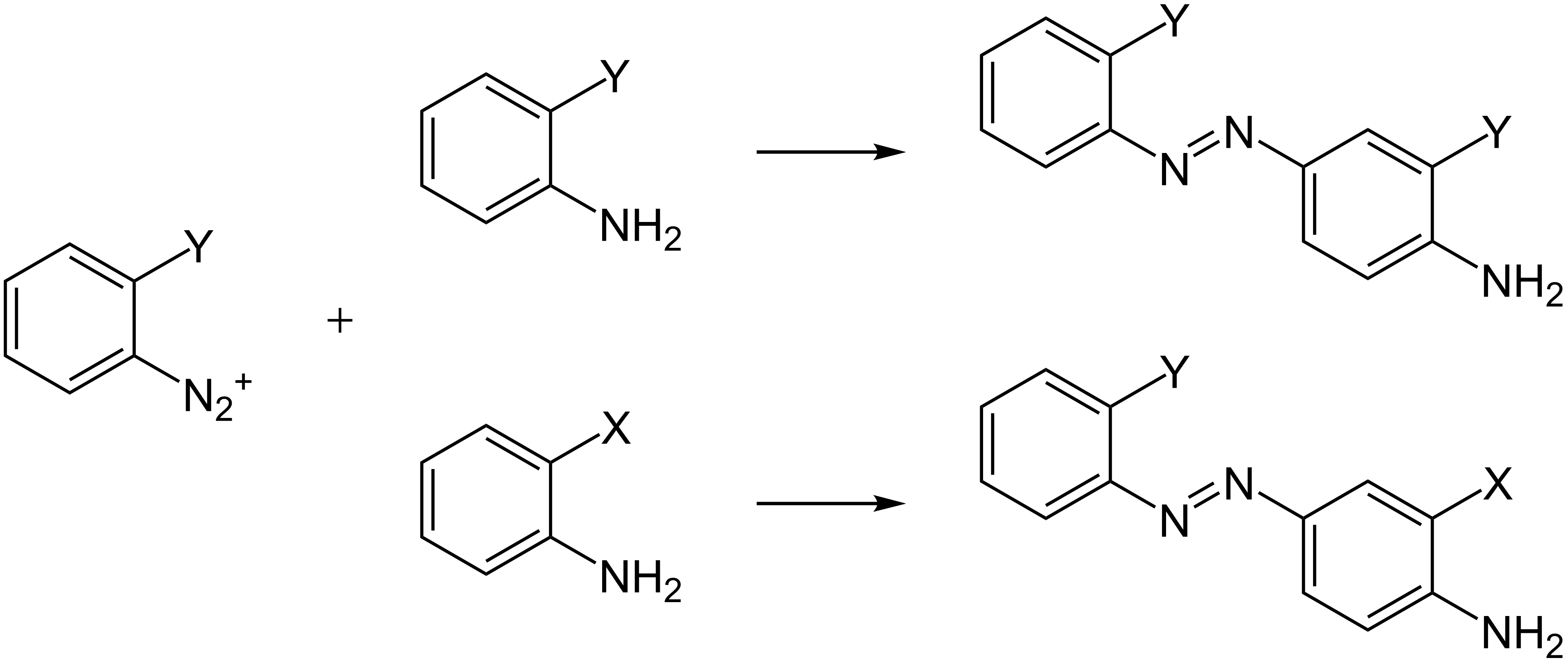 Triazen-Rekombination